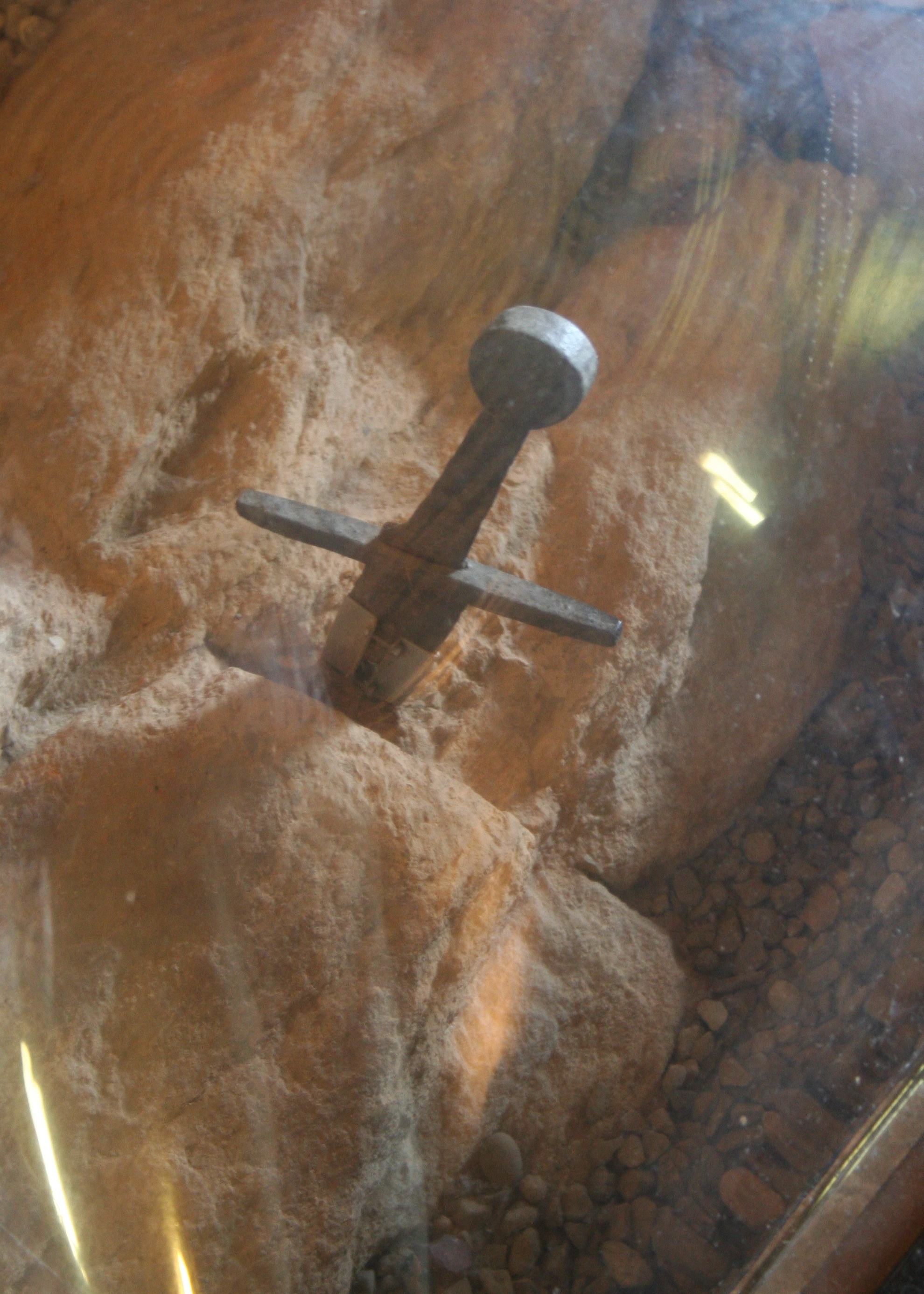 Montesiepi: San Galganos Sword